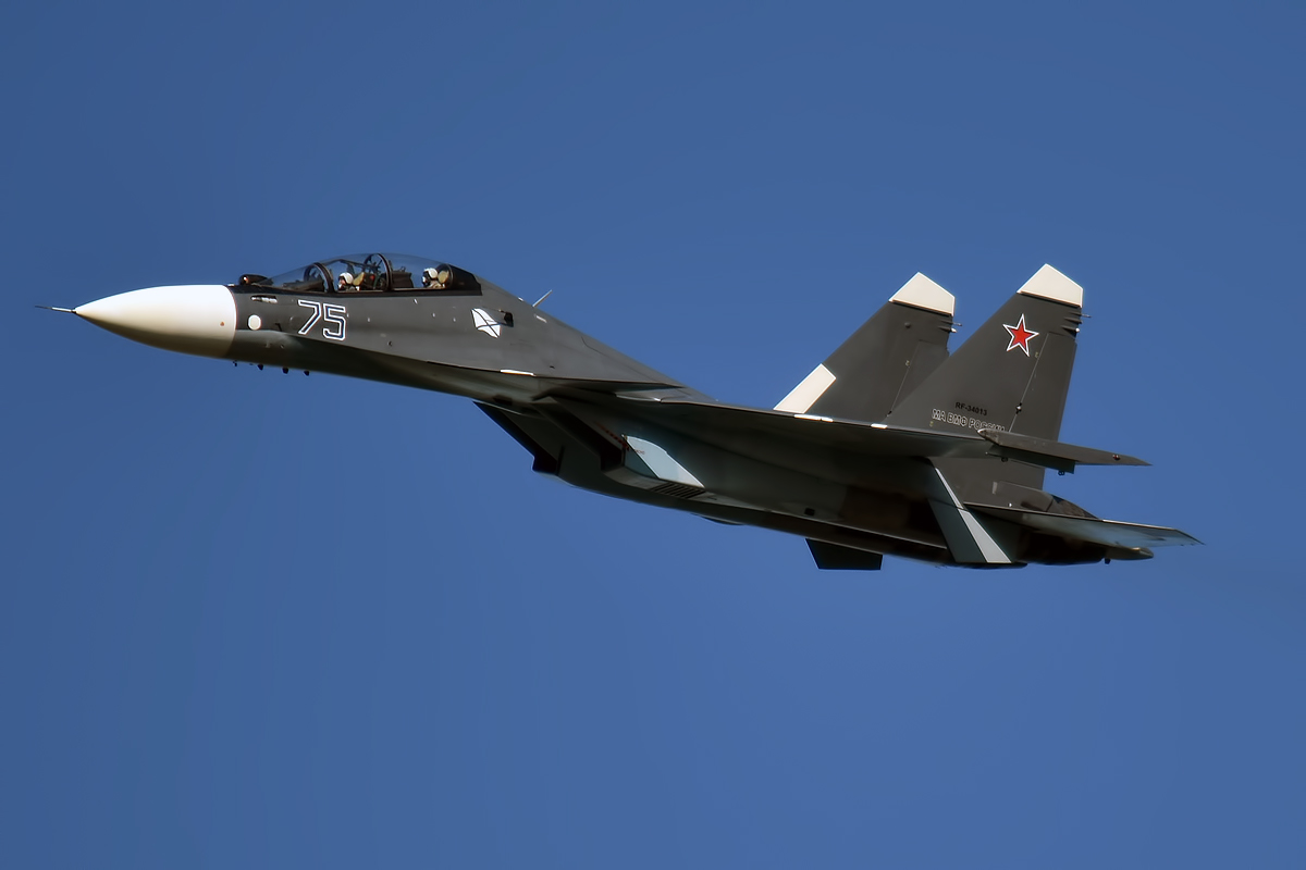 Russian Navy, RF-34013, Sukhoi Su-30SM